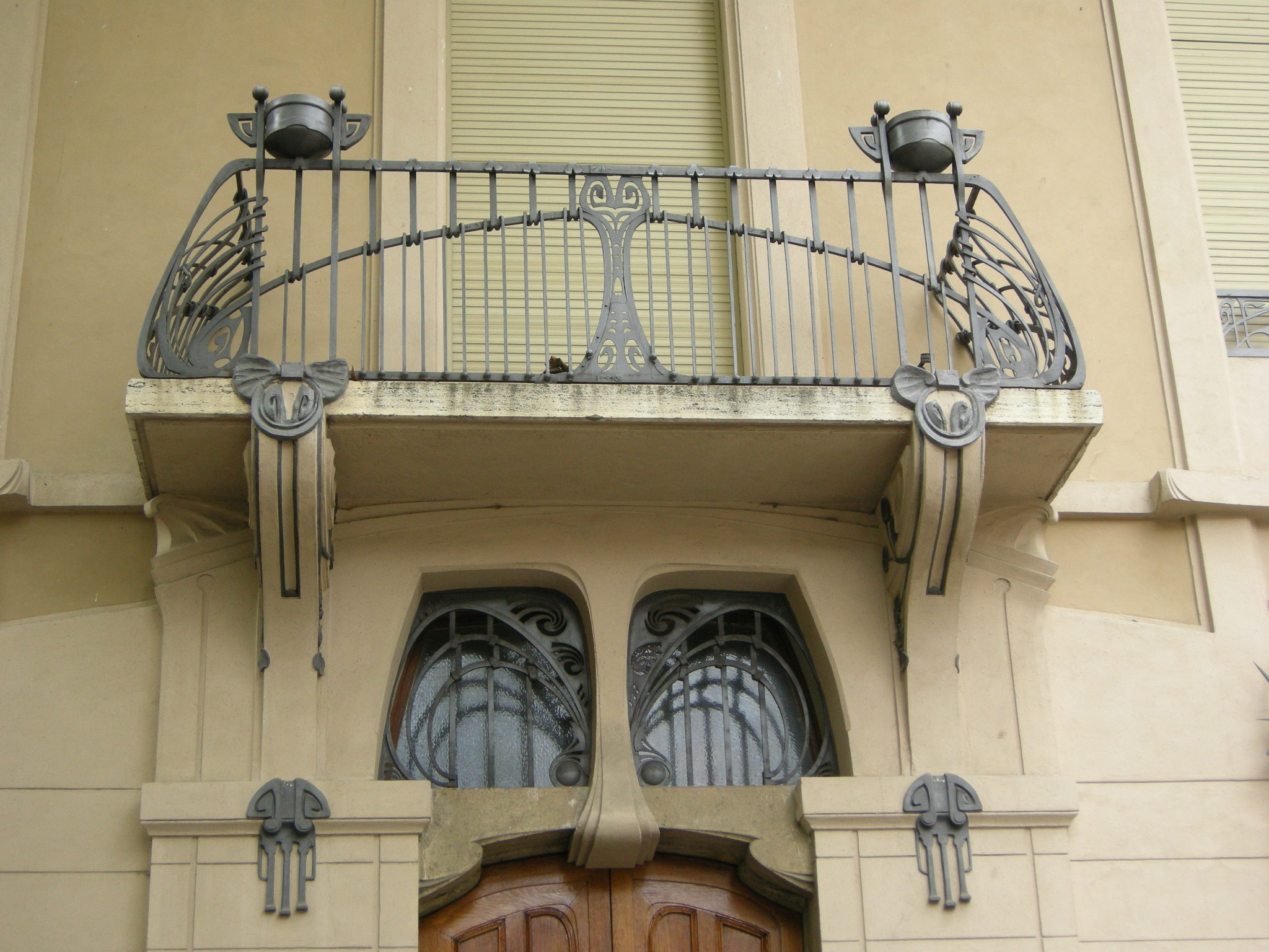 Villino lampredi n.9